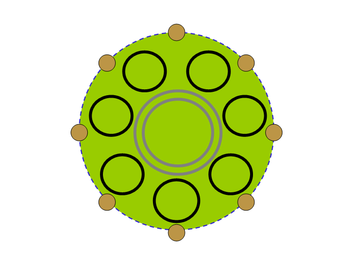 Cullerlie